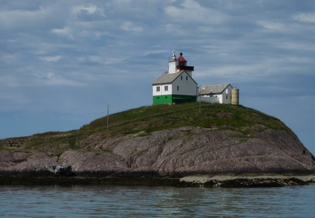 bilde av Asenvågøy fyr